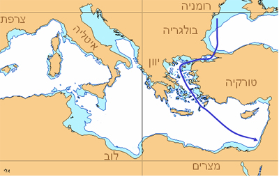 אוניית המעפילים אלי - מסלול